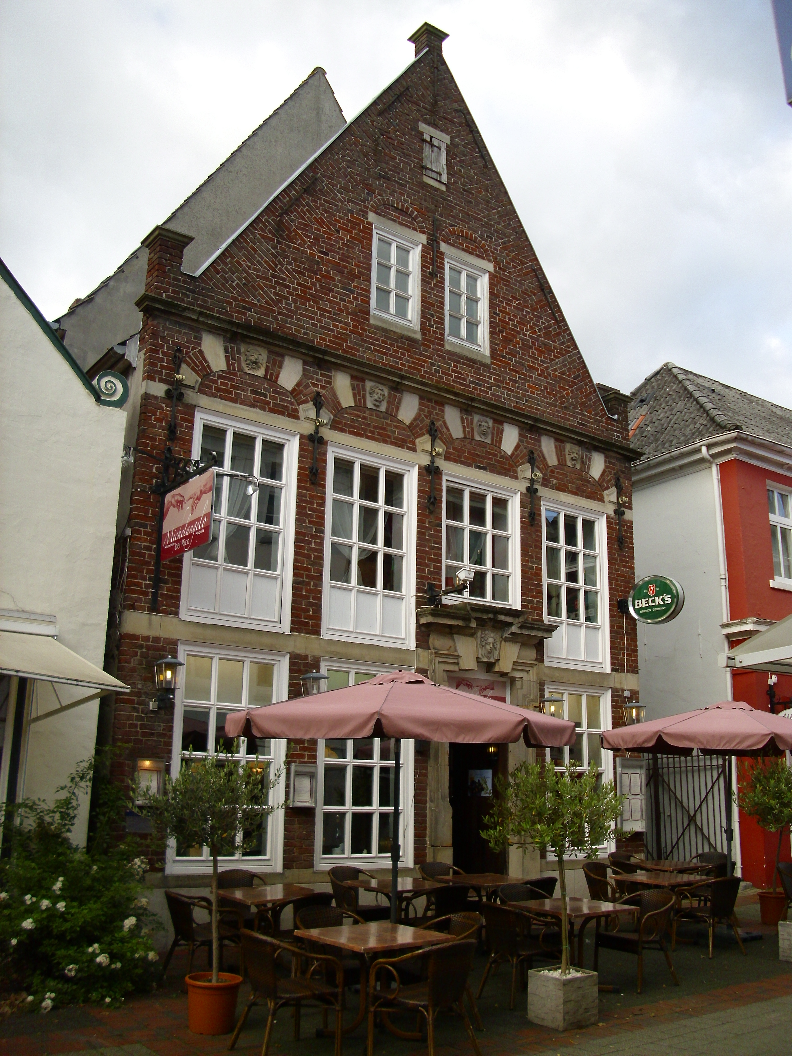 Fassade Altes Bürgerhaus Burgstraße 48, Aurich, Ostfriesland (September 2015)